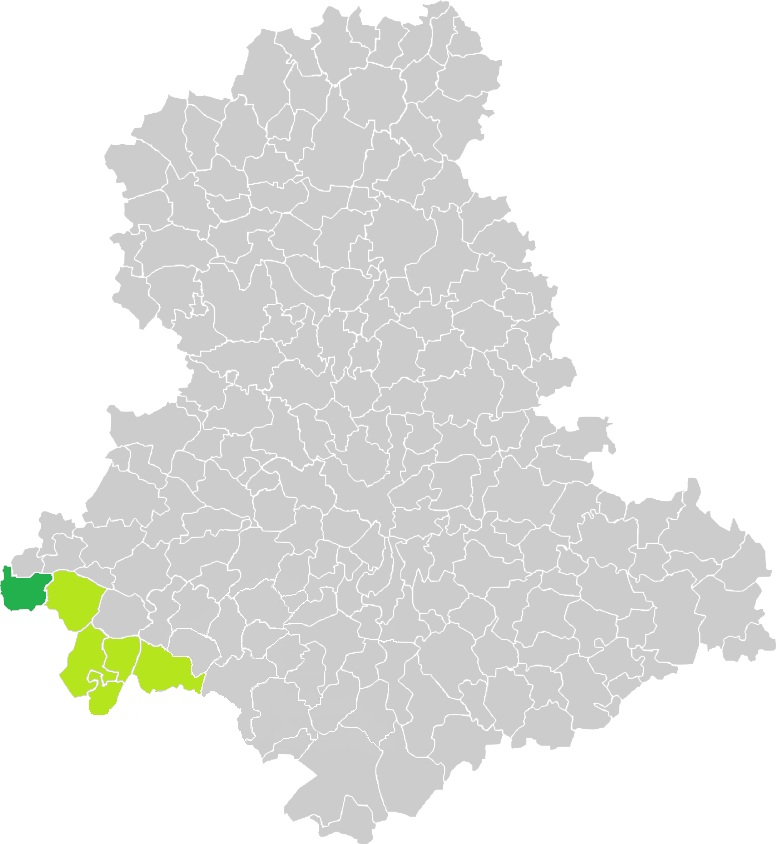 Carte de situation de la commune de Maisonnais-sur-Tardoire (en vert foncé) dans le votre Canton (en vert clair) sur une carte des communes de la Haute-Vienne